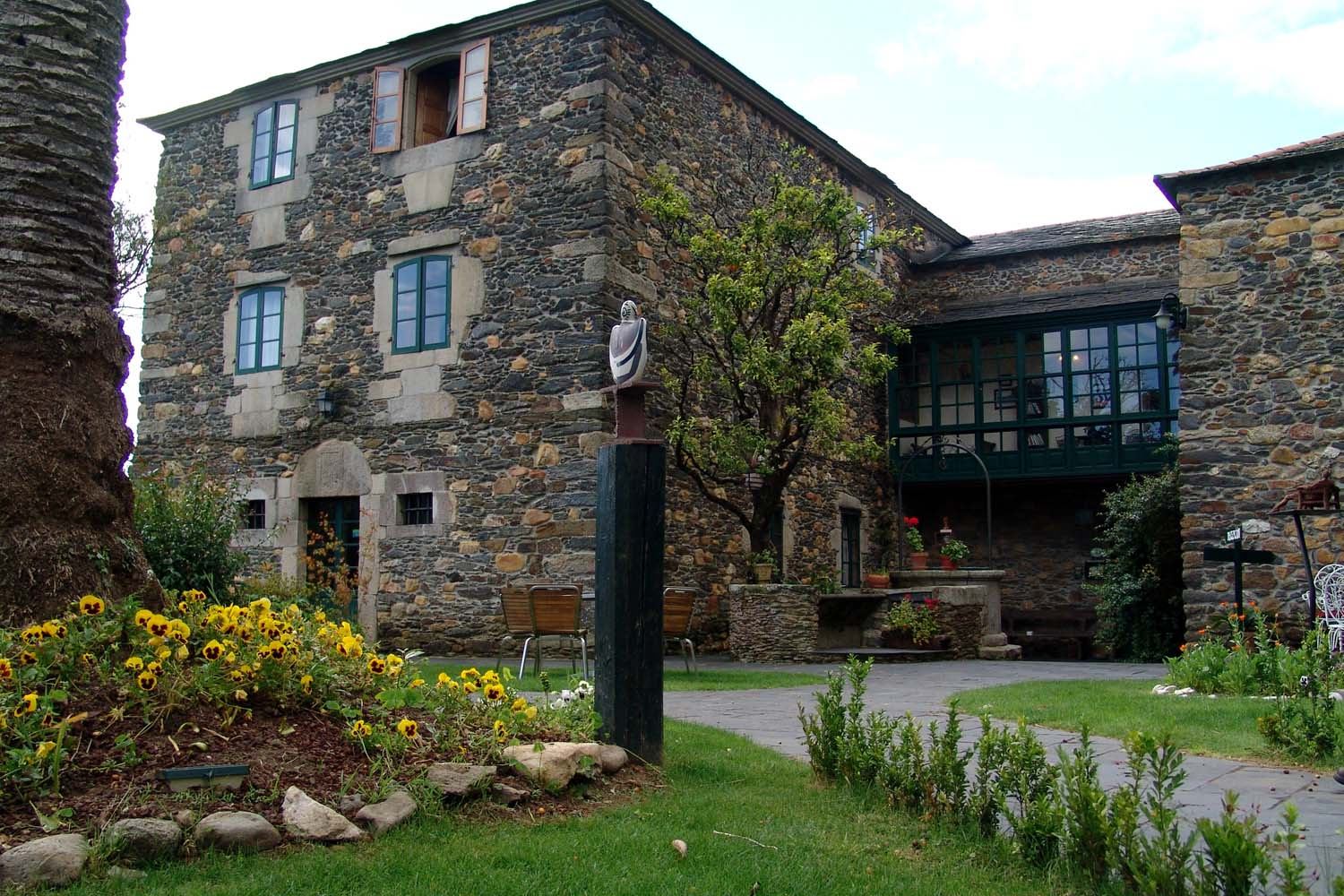 Foto del Pazo da Trave. Vista de su jardín y patio.